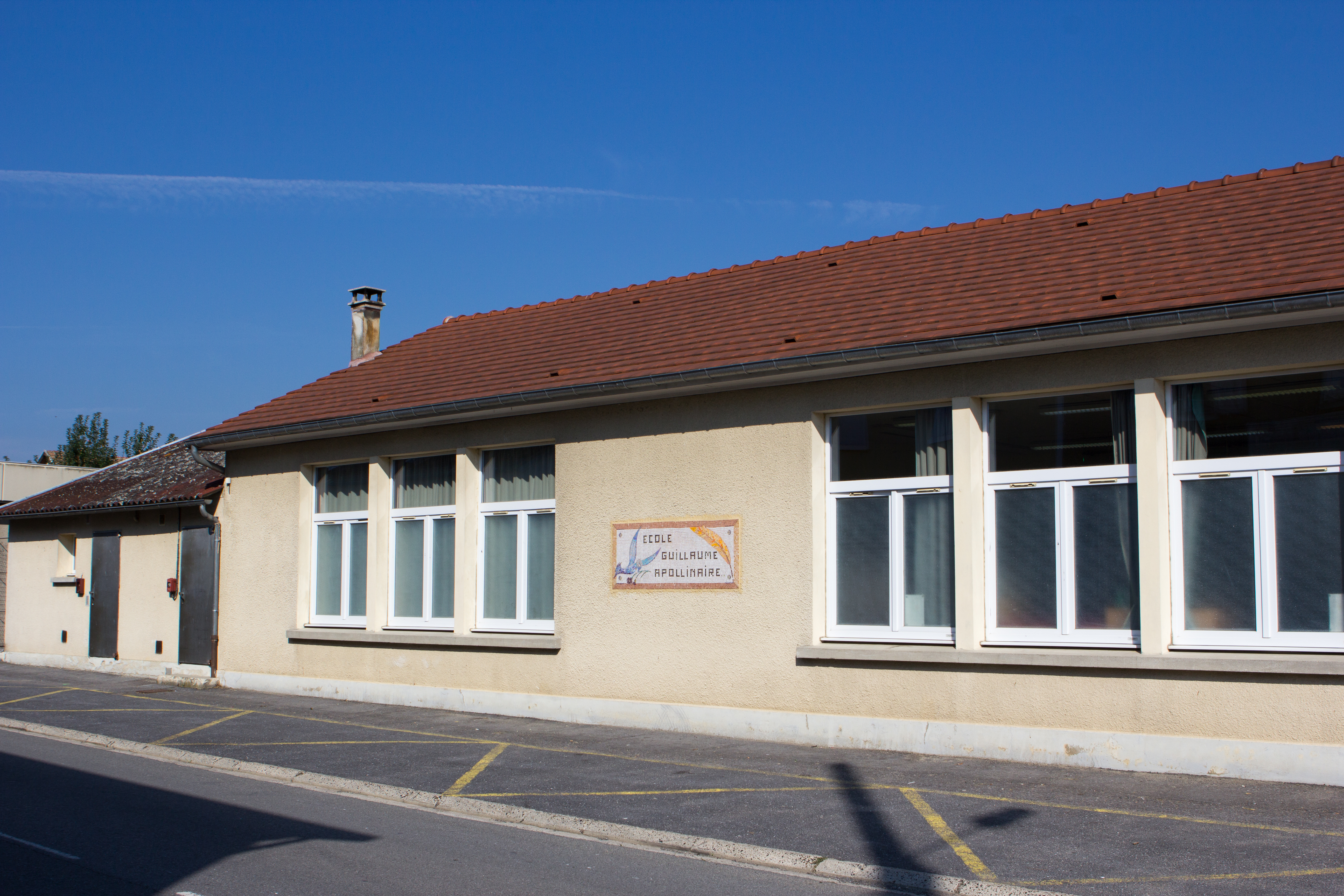 Ecole de Corbeny, Corbeny, Aisne, France